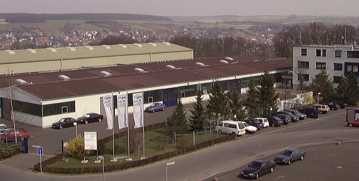 Gebäude Herrhammer GmbH